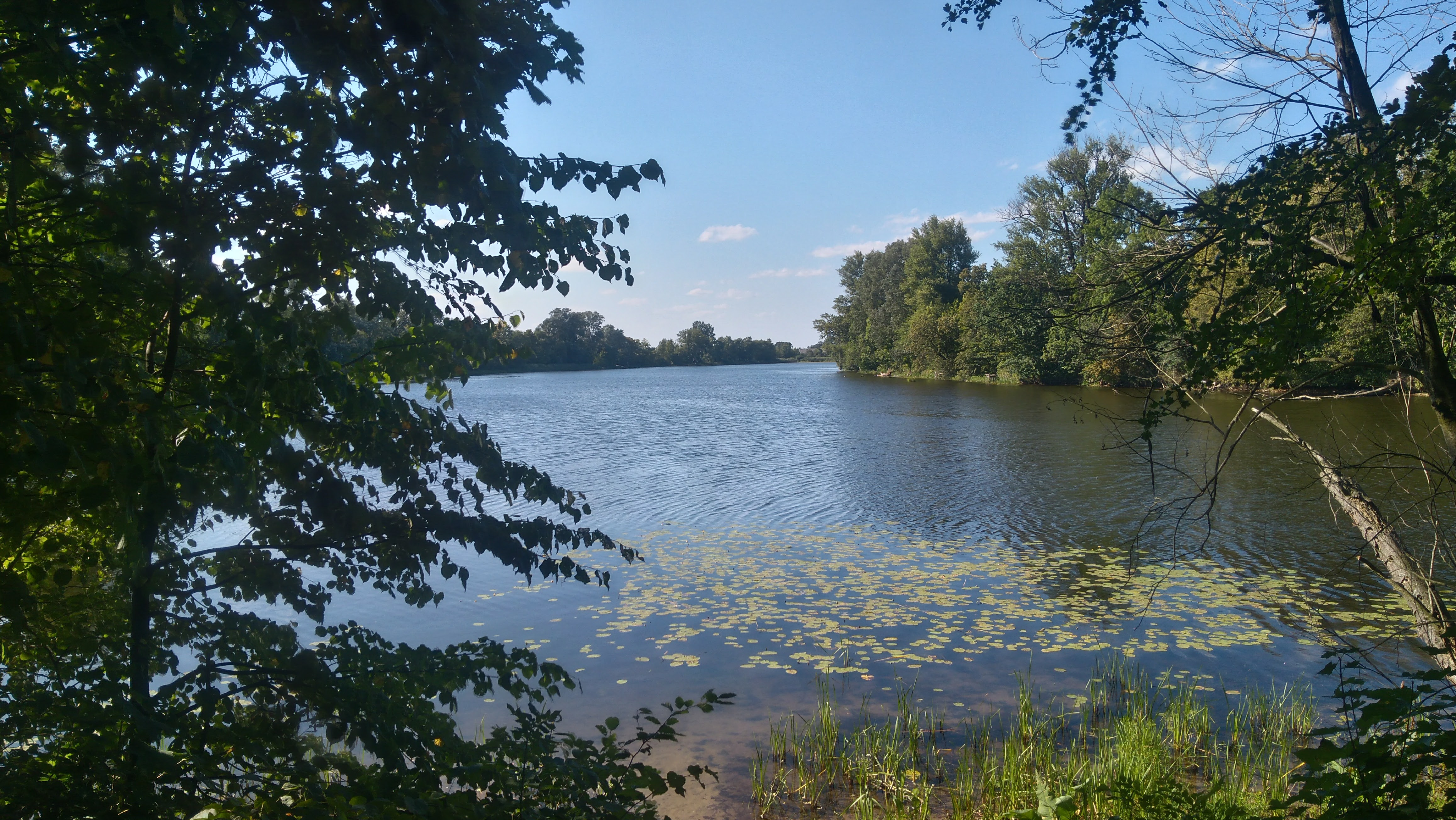 Otwock Wielki, Pałac w Otwocku Wielkim Wikidata has entry Q1680361 with data related to this item.